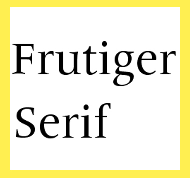 Mostra de Frutiger Serif